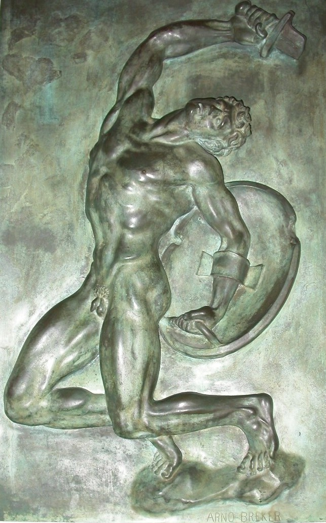 Copyright Museum Arno Breker/MARCO-VG, Bonn Toestemming publicatie.